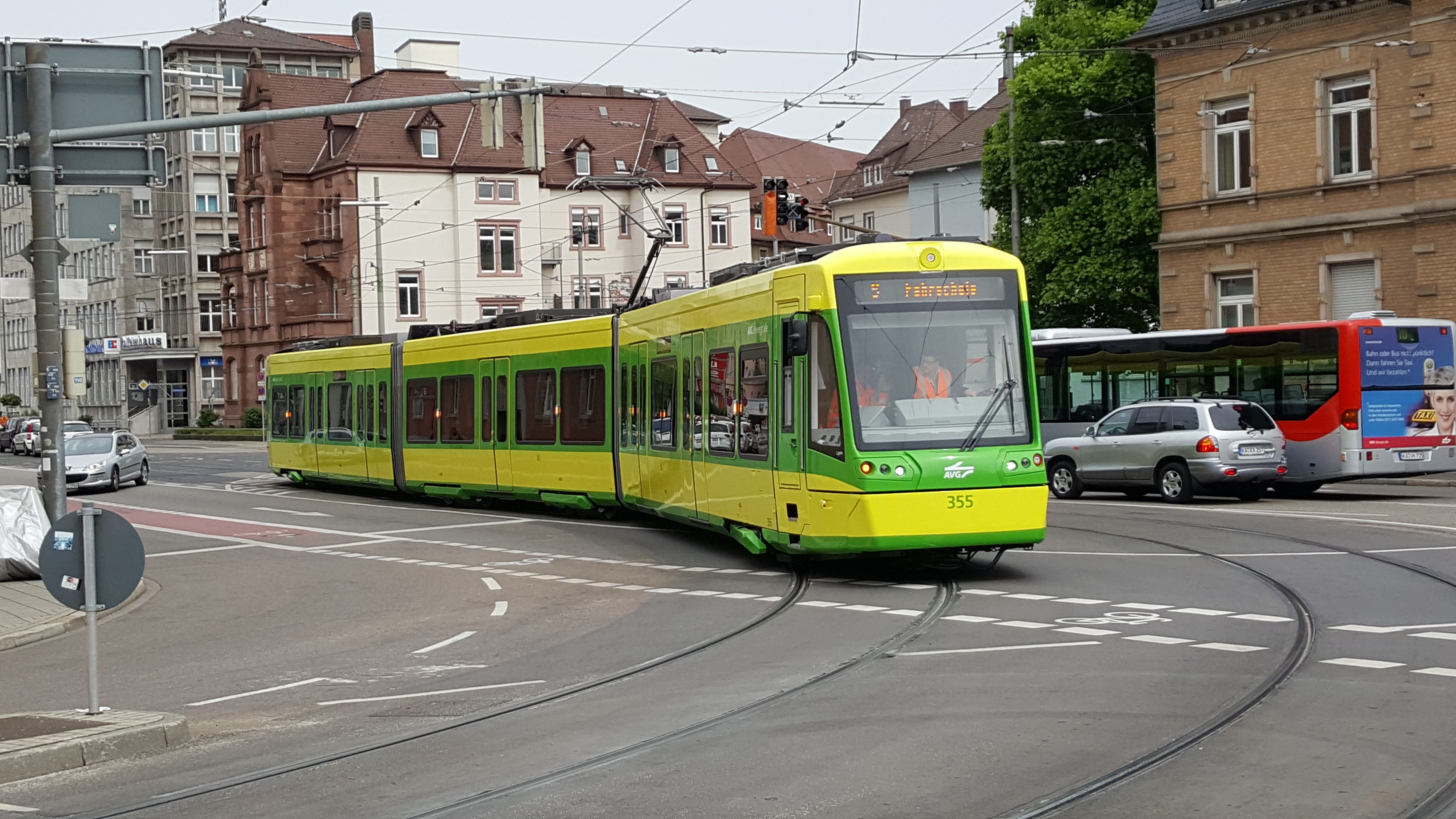 NET 2012 Citylink 355 Ecke Ettlinger Str. Poststraßen